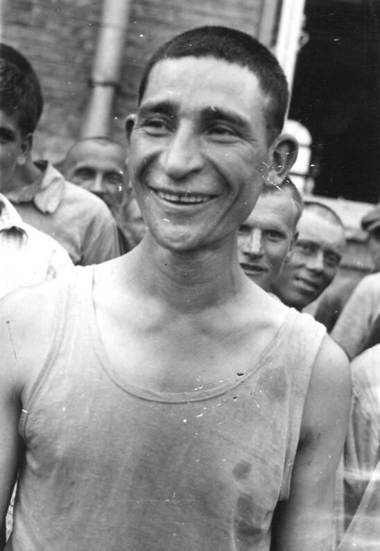 Prop.-Kp. 612 Archiv-Nr.: 9/2172 Bildberichter: E. Bauer Text: Uetrecht Ort: b. Radum Datum: 27.6.41 Text: Ein besonders schöner Vertreter seines Stammes - in Sowjet-Diensten.